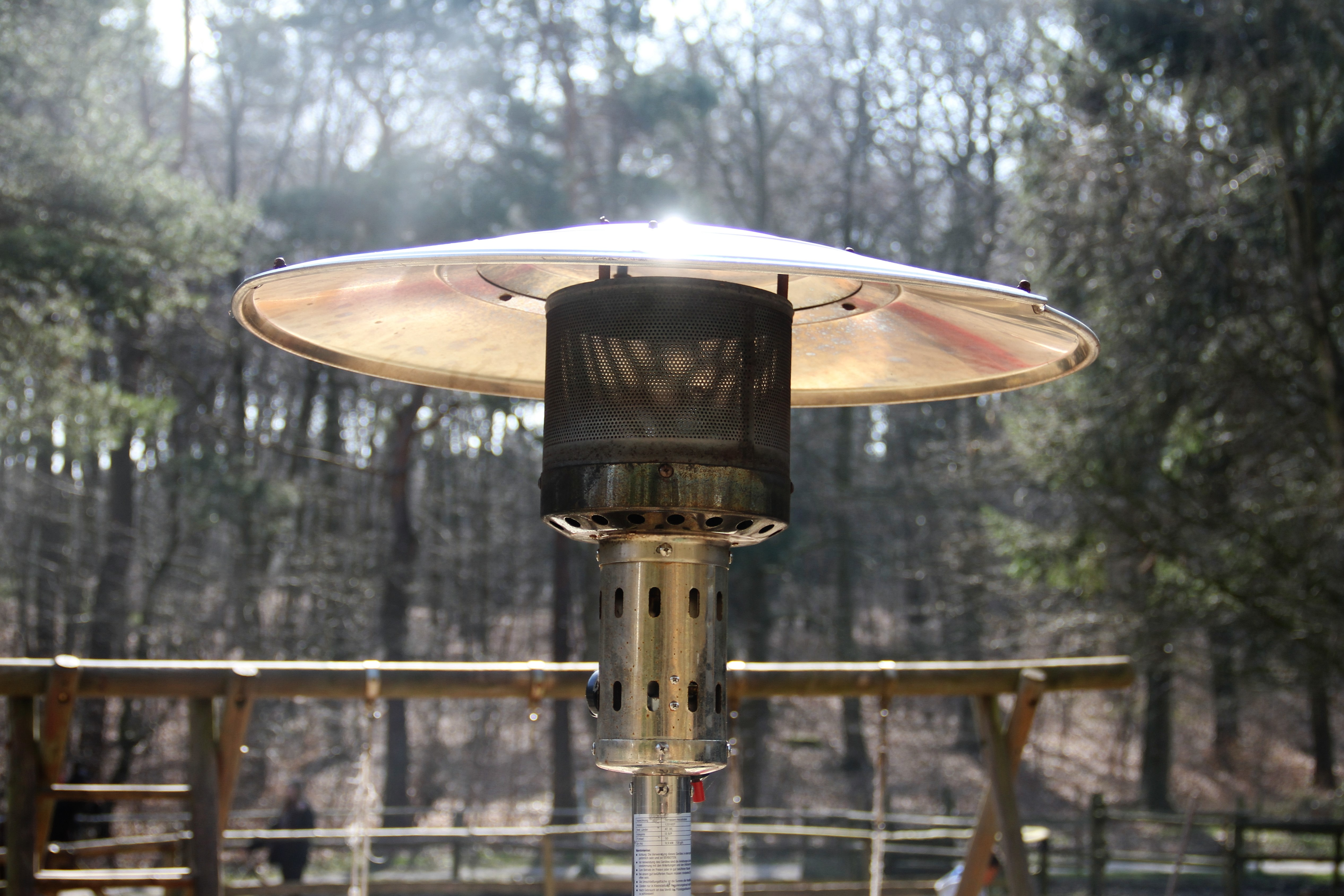 Kopfbereich eines handelsüblichen, gasbetriebenen Terrassenstrahlers ("Heizpilz"); hier auf einem privaten Ponyhof in Hamburg.